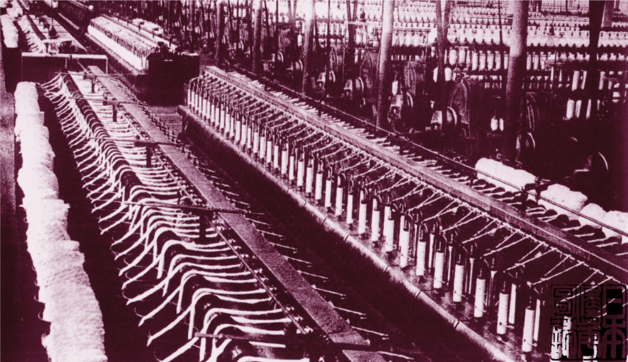 Fábrica textil de algodón de Japón en China/Sohu media